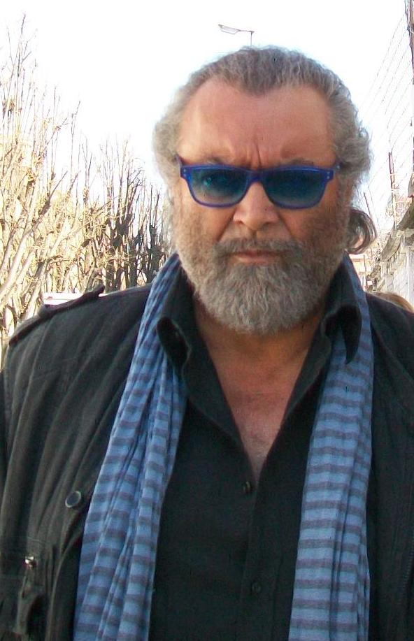 Francesco Léon e Diego Abatantuono